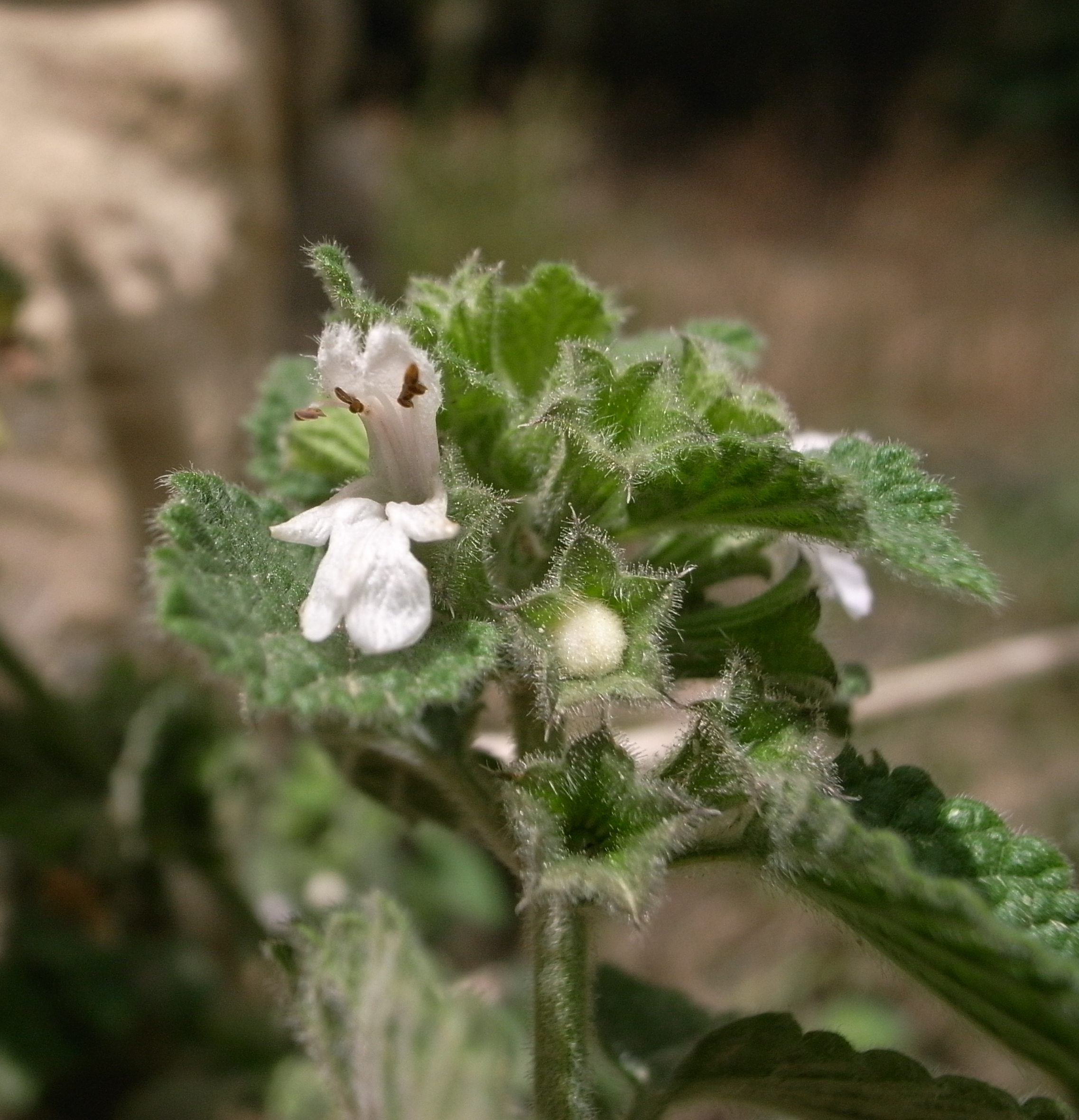 Ballota nigra subsp. uncinata, Dingli Cliffs, Malta Flora